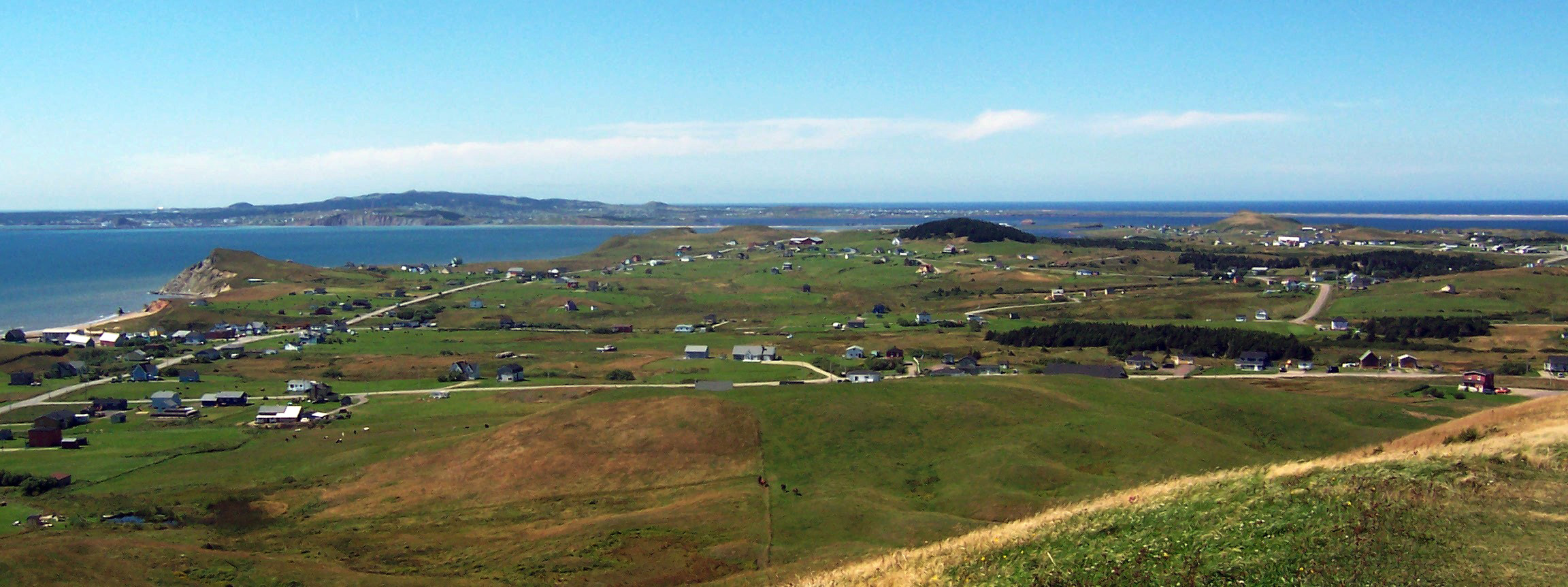 Panorama de l'île du Havre-aux-Maisons pris depuis le sommet de la Butte Ronde